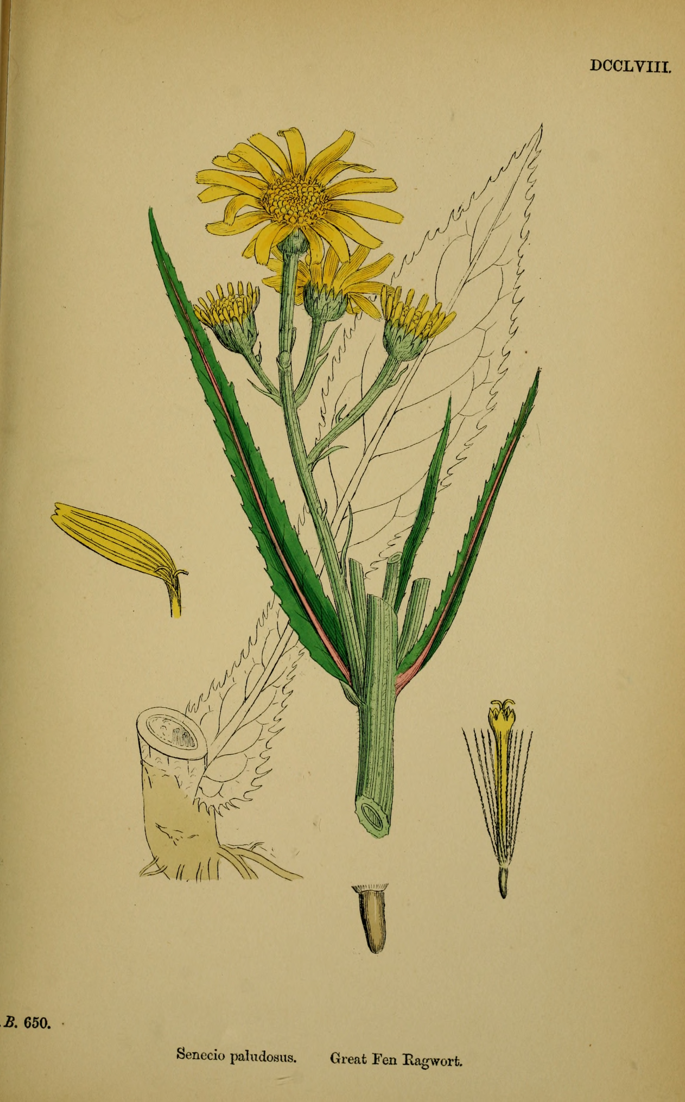 Legende: Oberer und unterer Teil der Pflanze. Strahlenblüte, Fruchtknoten entfernt. Frucht, Pappus entfernt. Röhrenblüte.